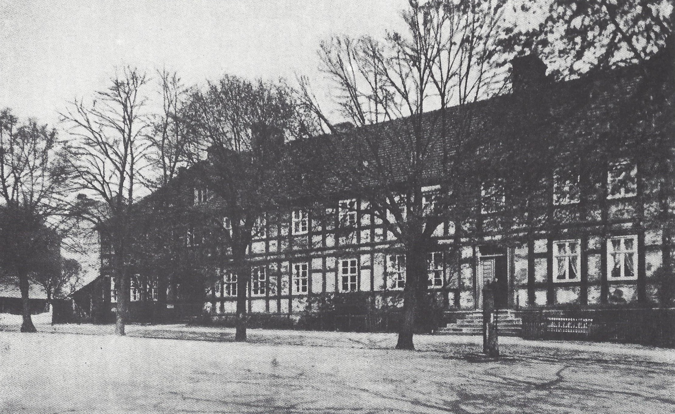 Universität Frankfurt a. O.: Fachwerkbau auf der Nordseite des Kollegiengrundstücks, gebaut am Anfang des 17. Jahrhunderts, diente wahrscheinlich als Unterkunft für Professoren und Studenten. Studenten wohnten auch in kleineren Häusern, den Bursas, außerhalb des Kollegienbereichs.